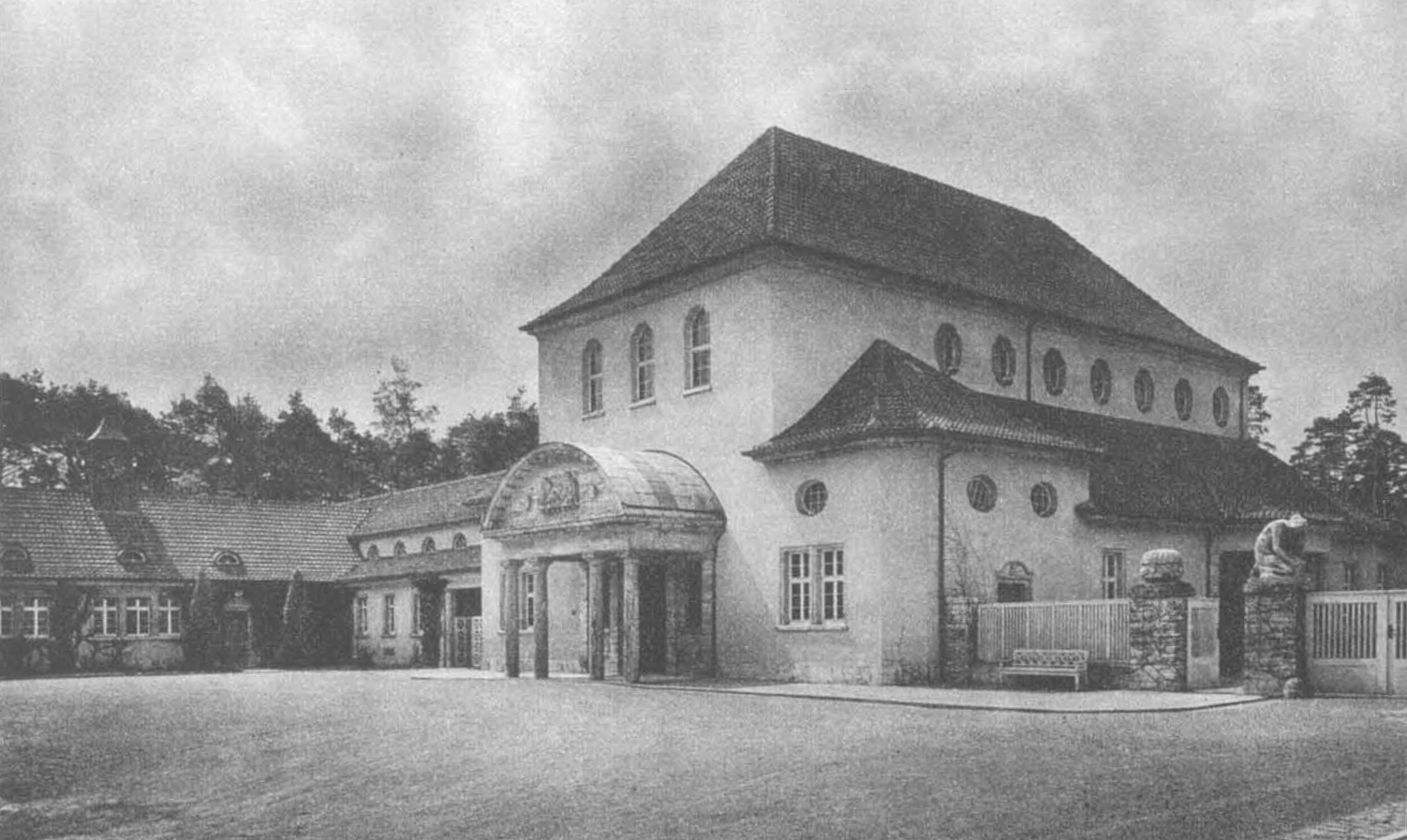 Waldfriedhof in Stuttgart, Feierhalle, 1921.